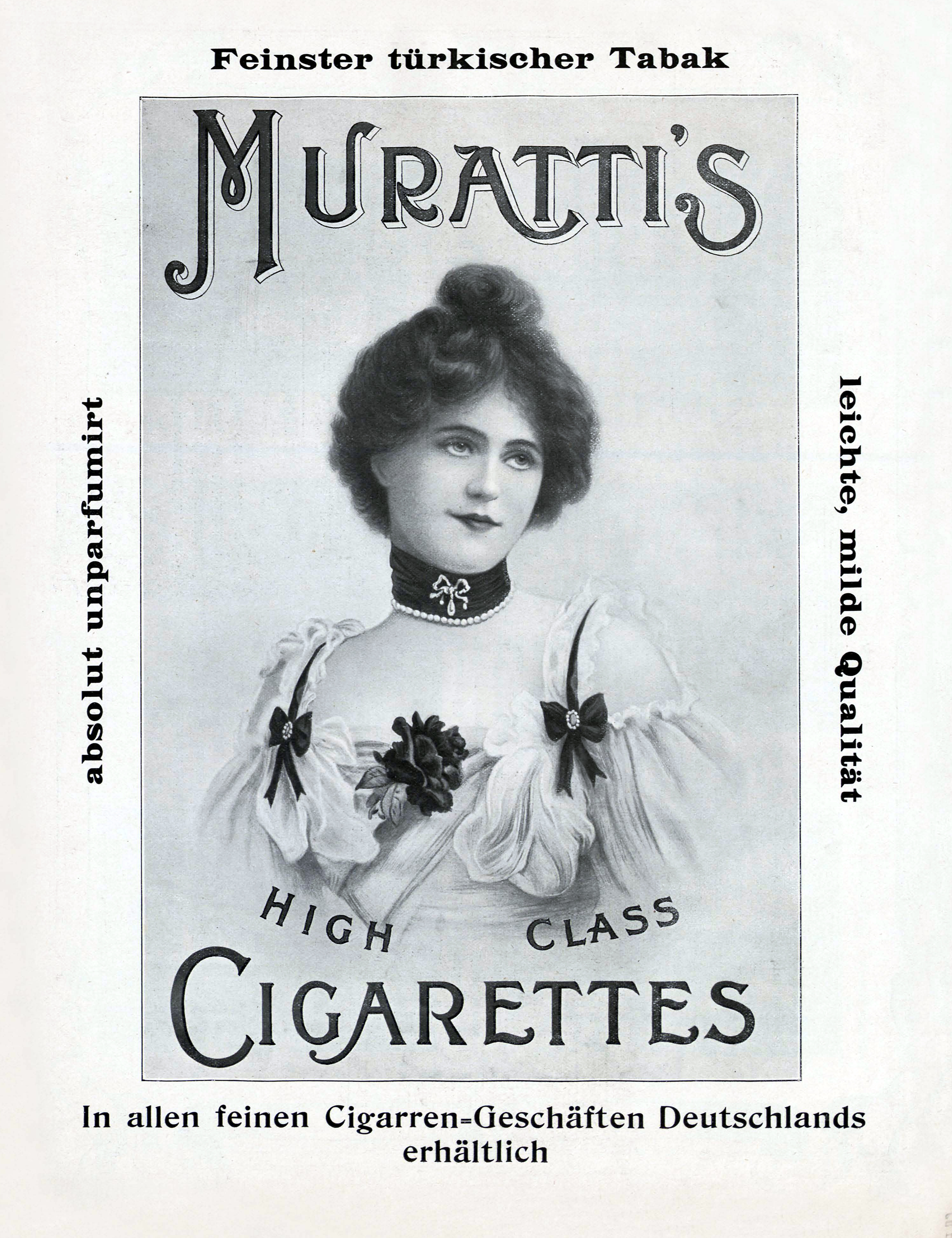 Ad for Muratti cigarettes in a German magazine (1902)